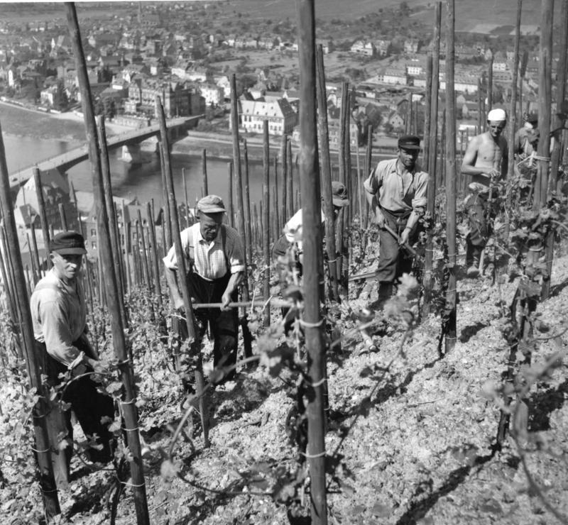 Weinbergarbeiten an der Mosel im Frühjahr